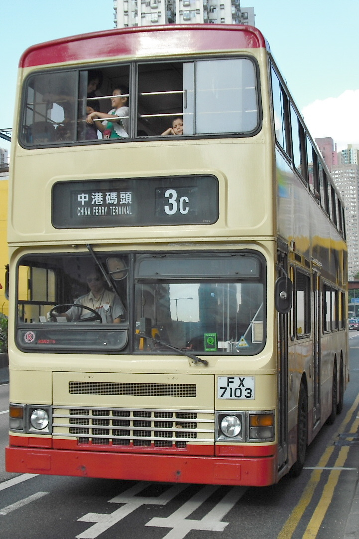 九巴3C線的非空調巴士，攝於黃大仙中心對出巴士站